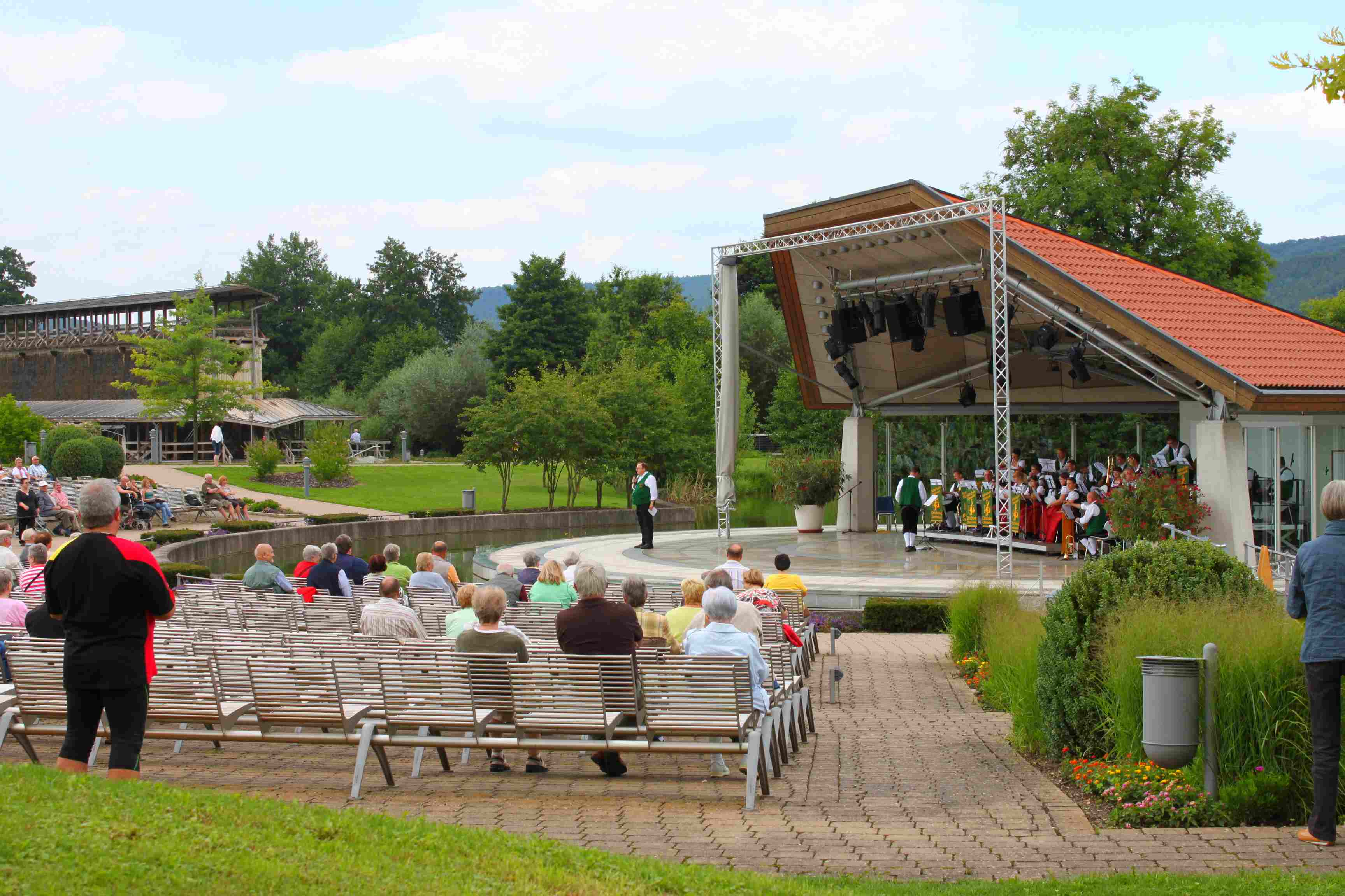 Seebühne mit Blaskapelle im Kurpark Bad Staffelstein